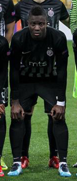 Динамо - Партизан 4:1. Команда Александра Хацкевича без проблем обыграла Партизан и выиграла свою группу (4:1)